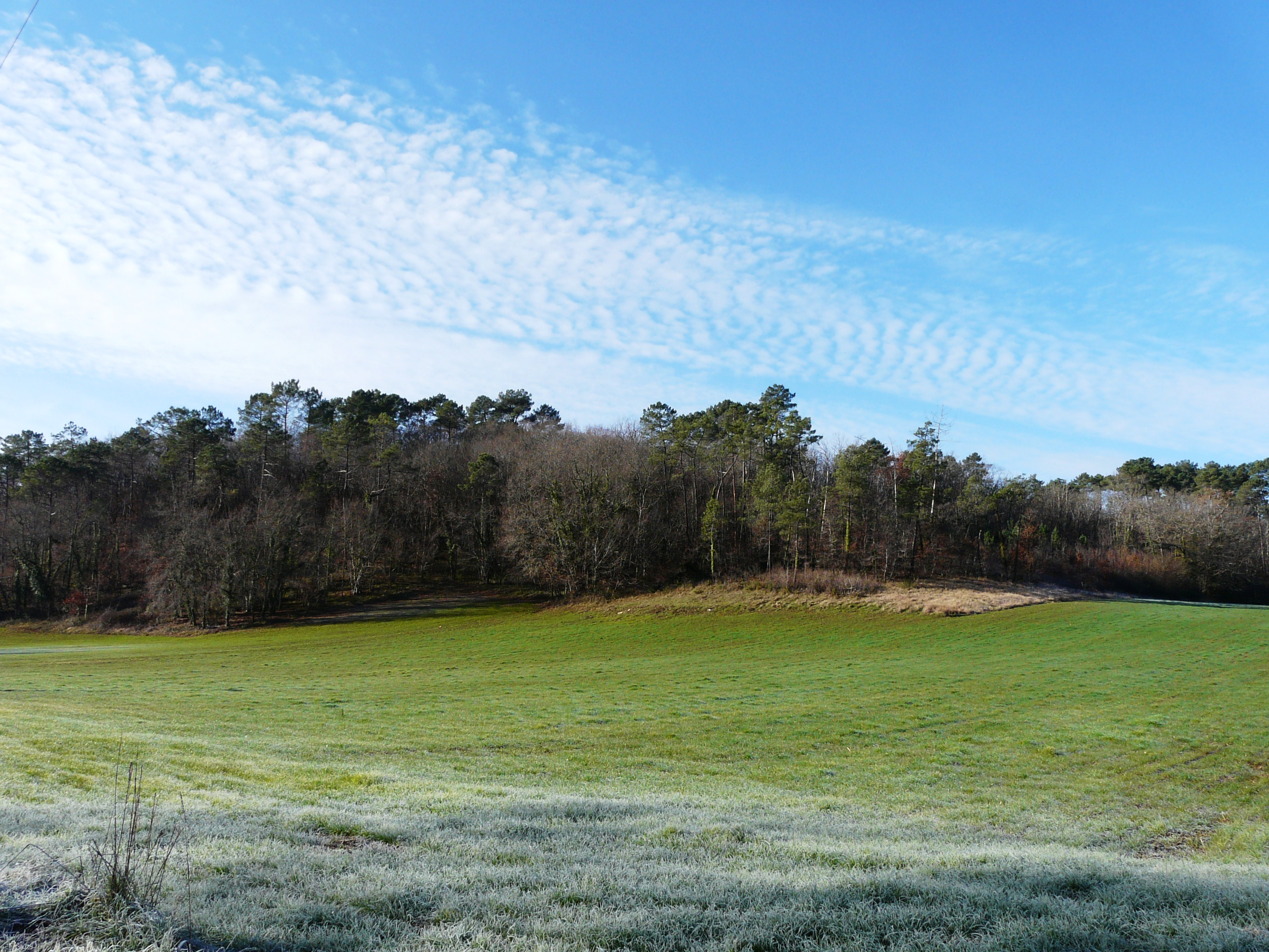 La forêt du Landais au lieu-dit les Combes, Sourzac, Dordogne, France. La zone photographiée fait partie d'un site inscrit (Château de Maupas et ses abords).